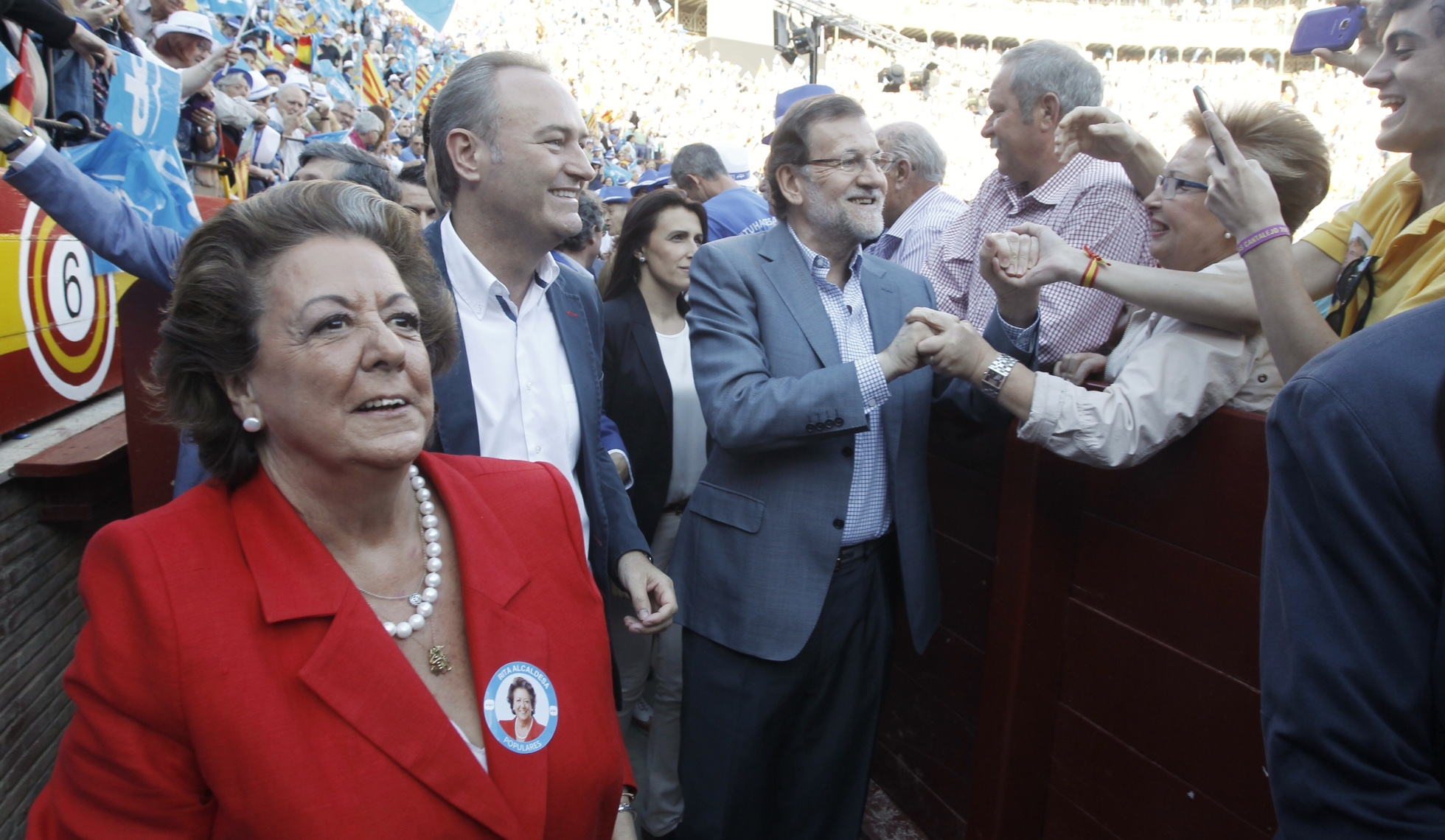 Fabra participa en el mitin central del PPCV en la plaza de toros de Valencia